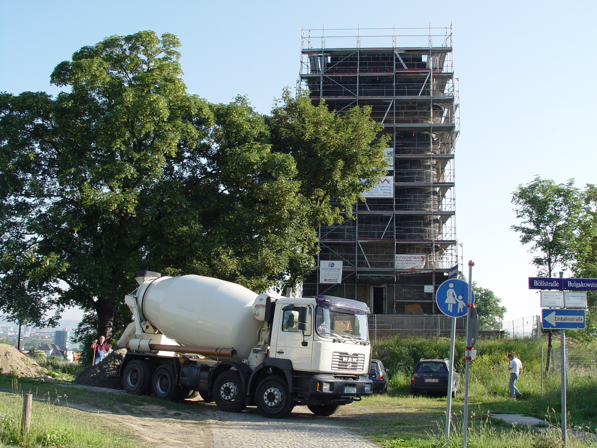 Bismarcksäule Dresden-Räcknitz